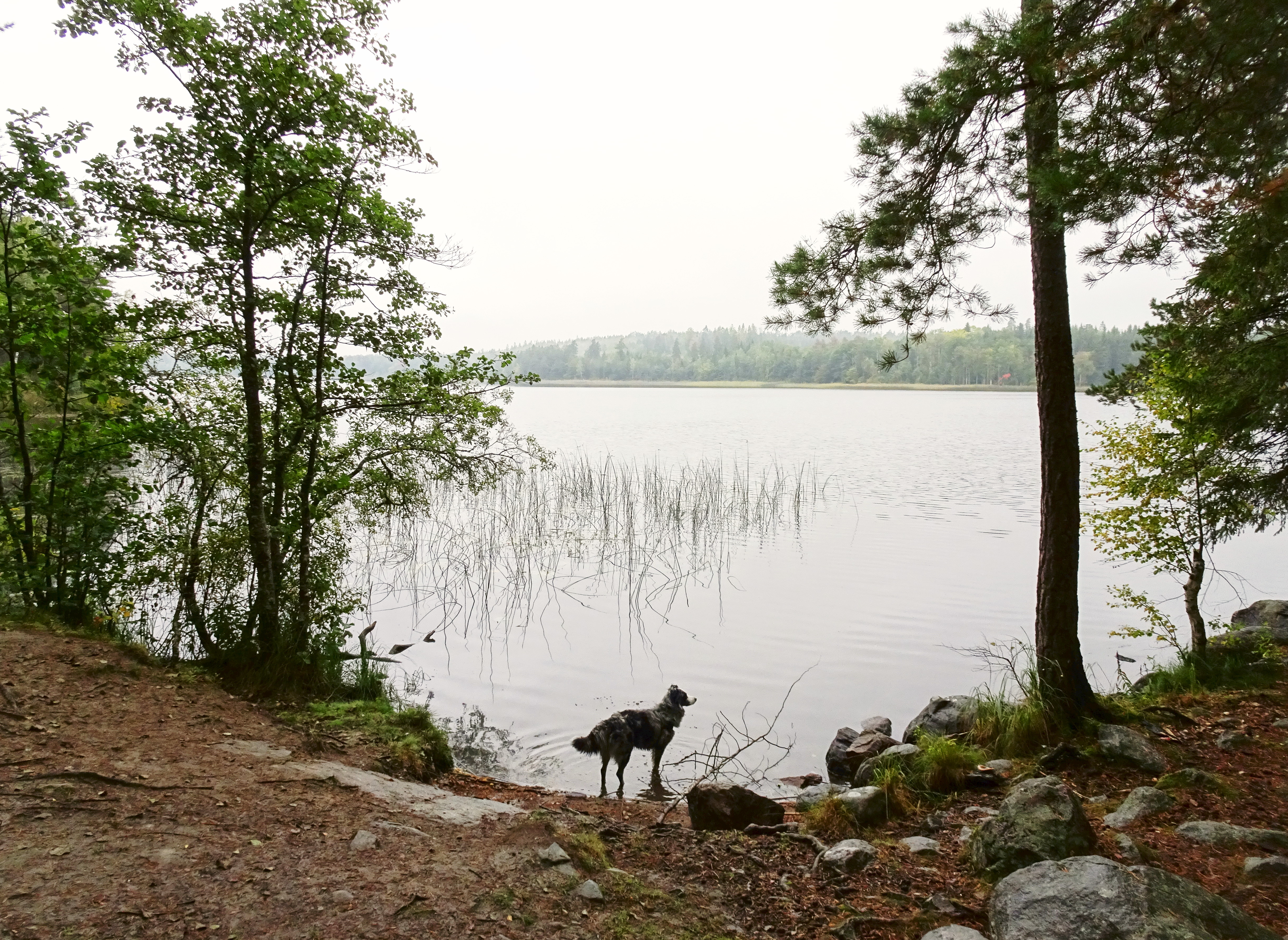 Göksjön, Södermanland, vid Bredsjönäskonsten